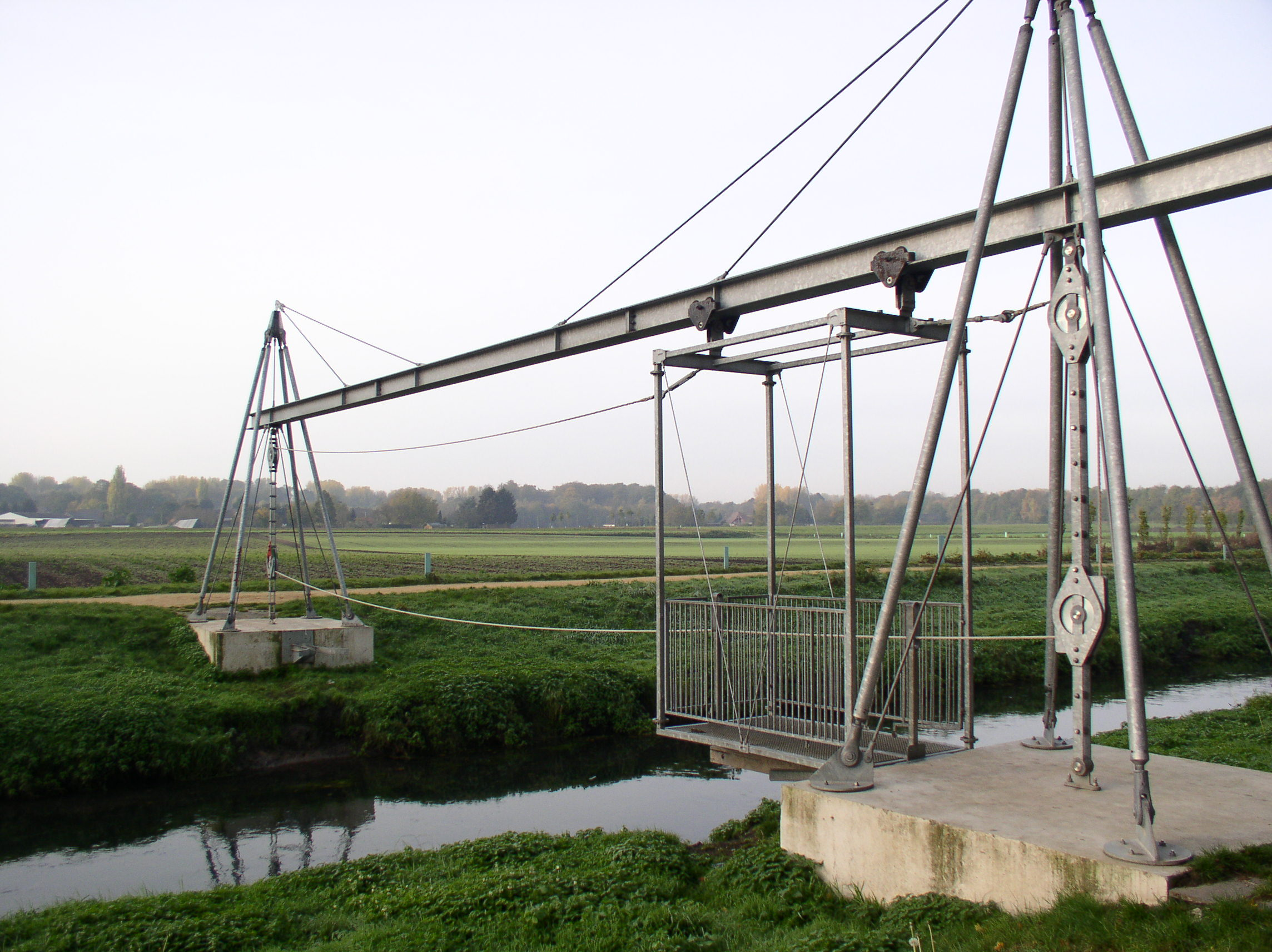 Schwebefähre über die Niers zwischen Mönchengladbach und Willich/Kreis Viersen (parallel zur Cloerbruchallee)